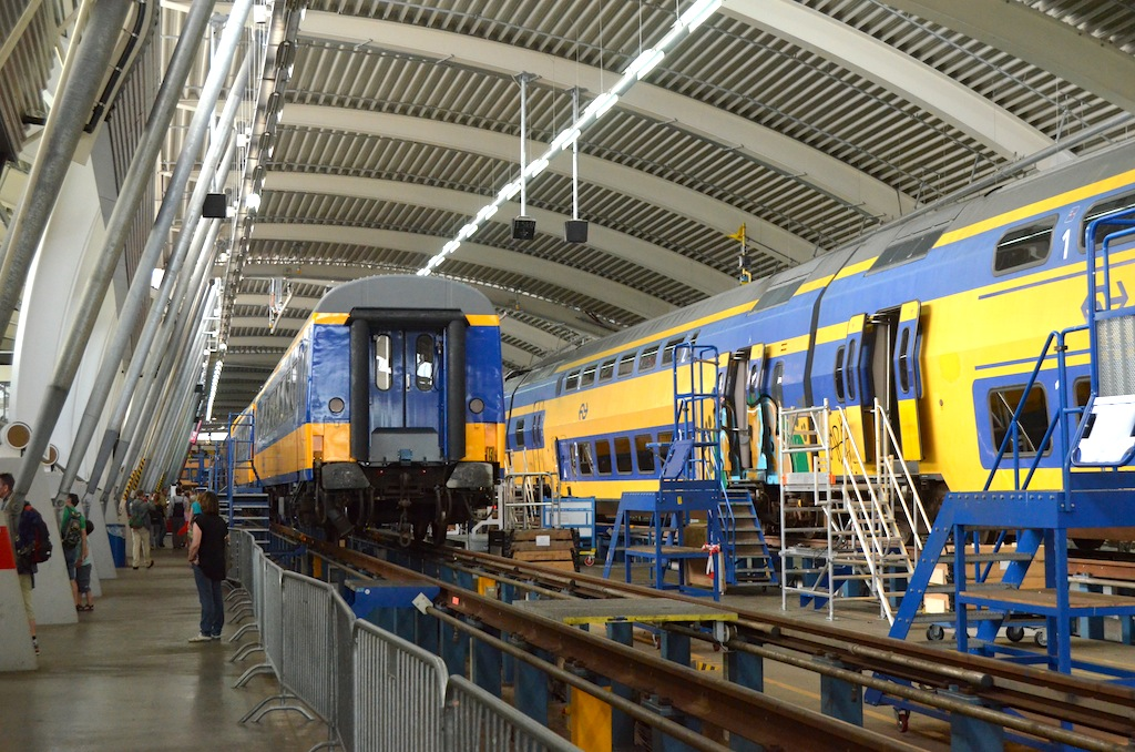 Hoofdwerkplaats Haarlem - Opgebokte rijtuigbakken. Foto: Erik Swierstra.